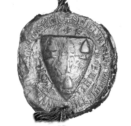 Rátót nb. Loránd nádor pecsétje, 1255